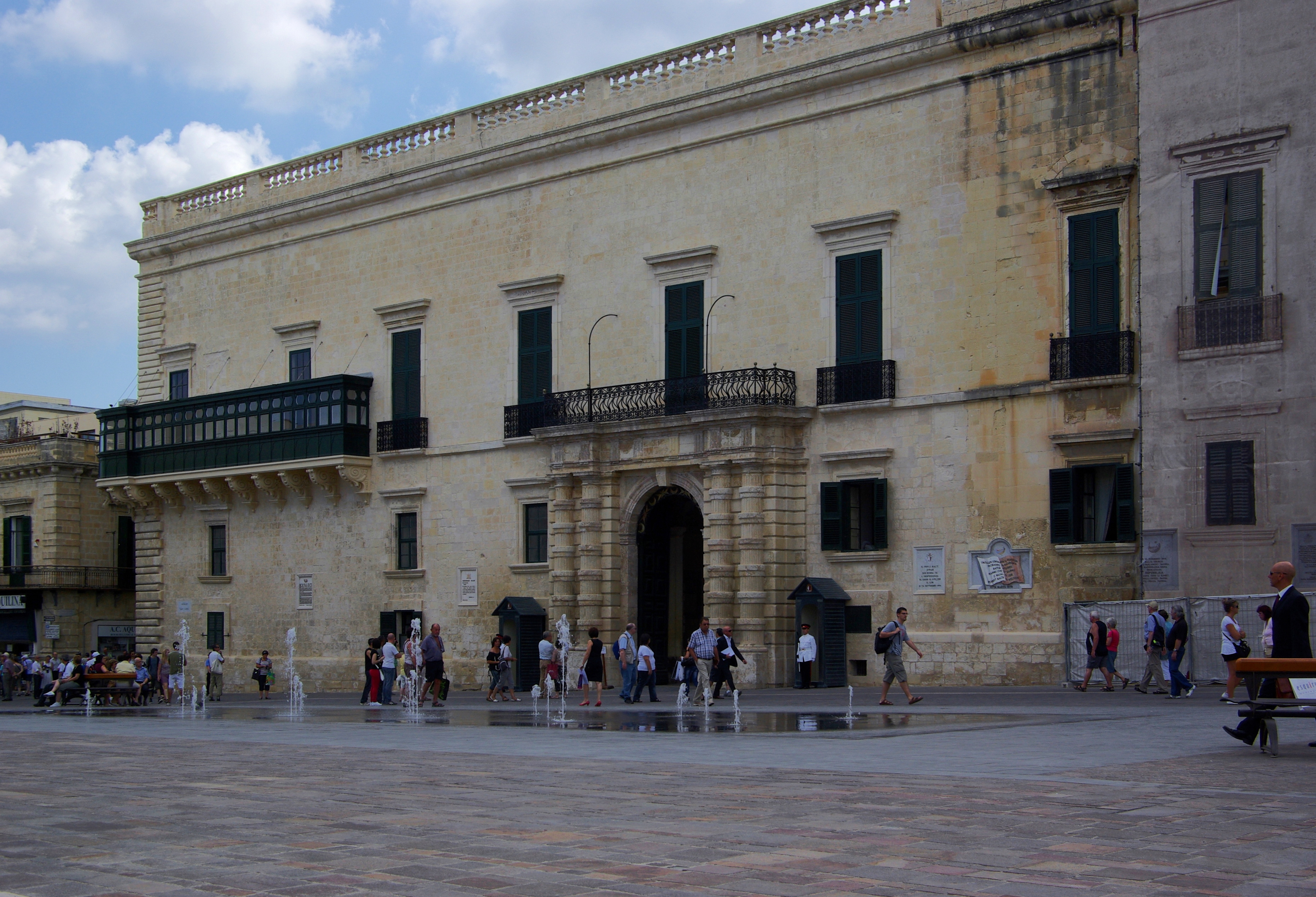 Malta Valletta, Nord-Ost des Großmeisterpalastes